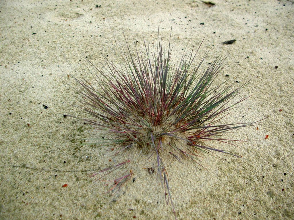 Roślinność sucholubna w Puszczy Bydgoskiej